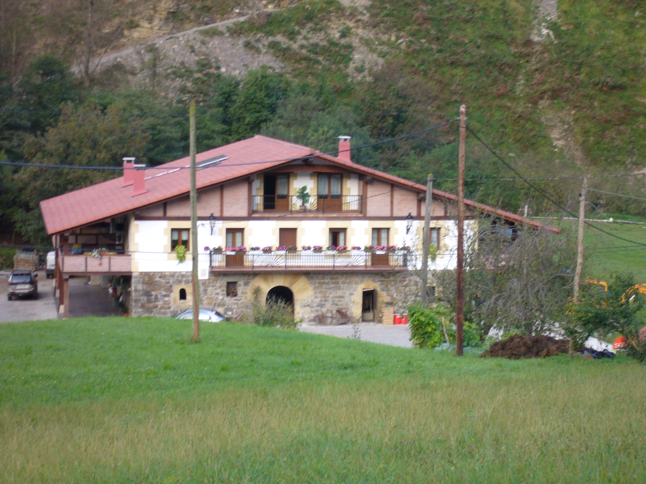 Mañarin zelai baserria